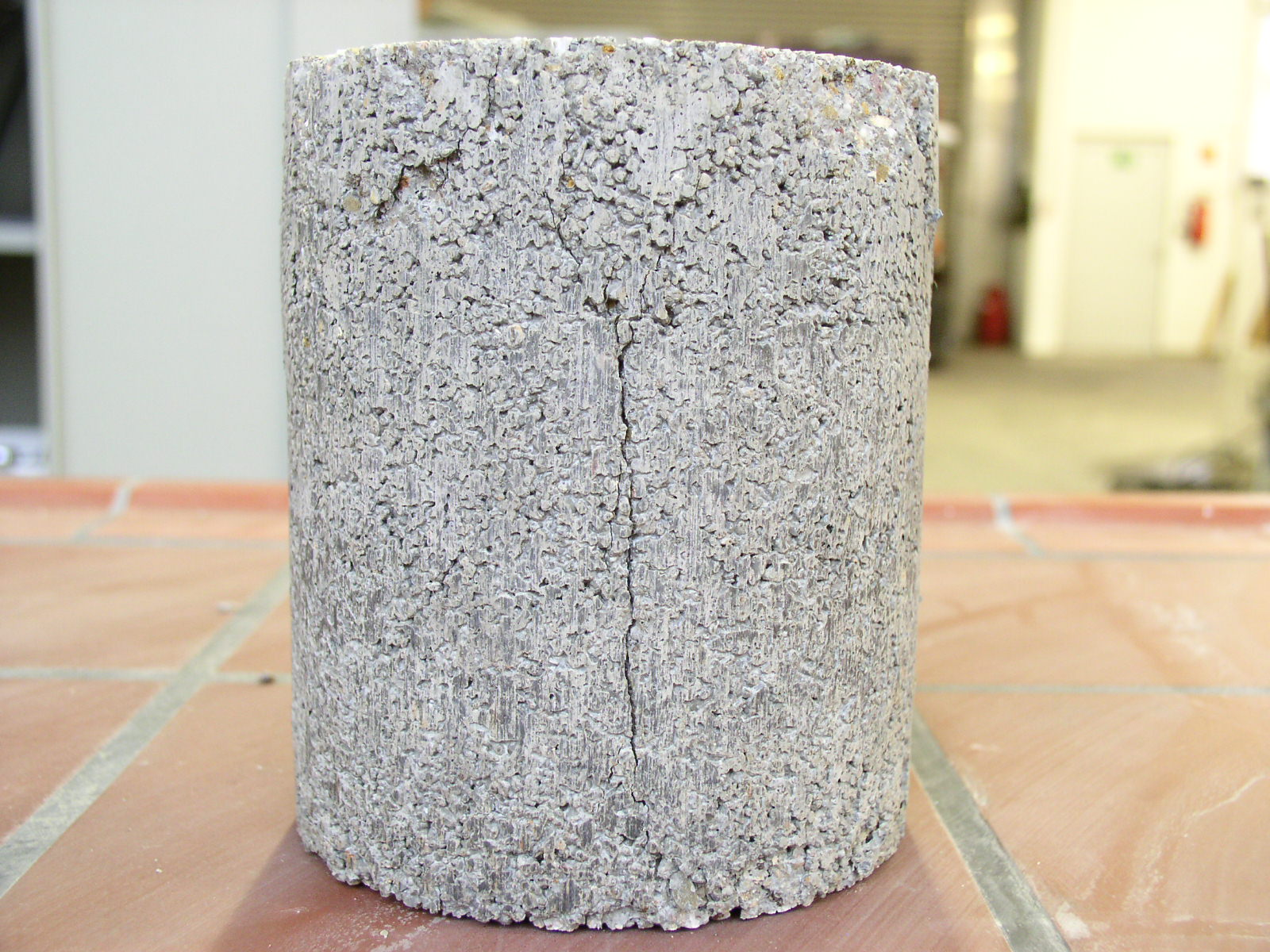 Proctorkörper nach der Druckfestigkeitsprüfung. Der Mörtel wurde mit einem Wasserfeststoffwert von 0,08 hergestellt (entspricht 2,0 l Wasser/25 kg Trockenmörtel).